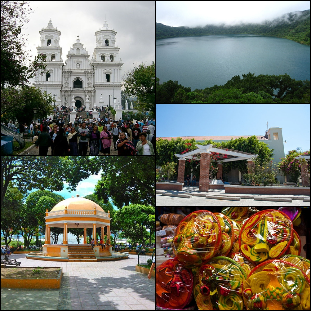 Chiquimula-Collage